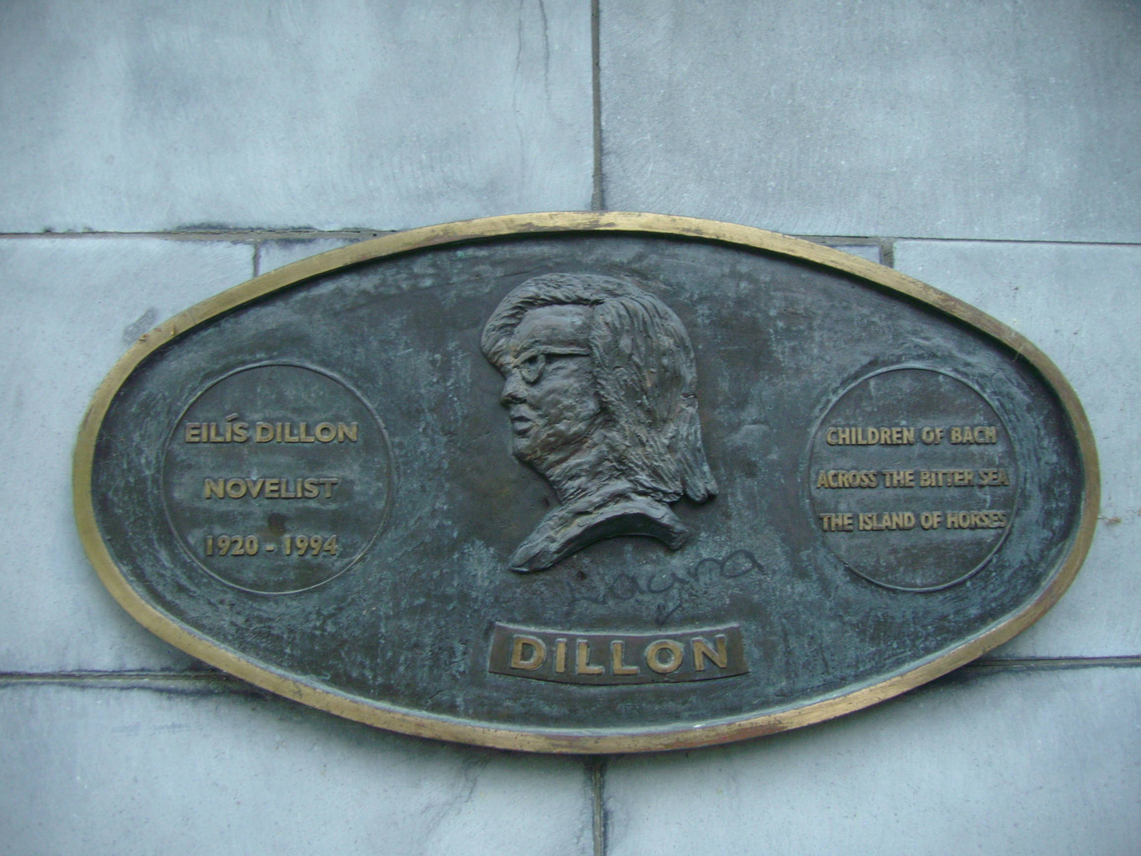 Eilís Dillon (1920–1994), irische Schriftstellerin; Plakette im Saint Patrick's Park, Dublin, dort angebracht anlässlich der Dublin Millennium 988–1988 Literary Parade